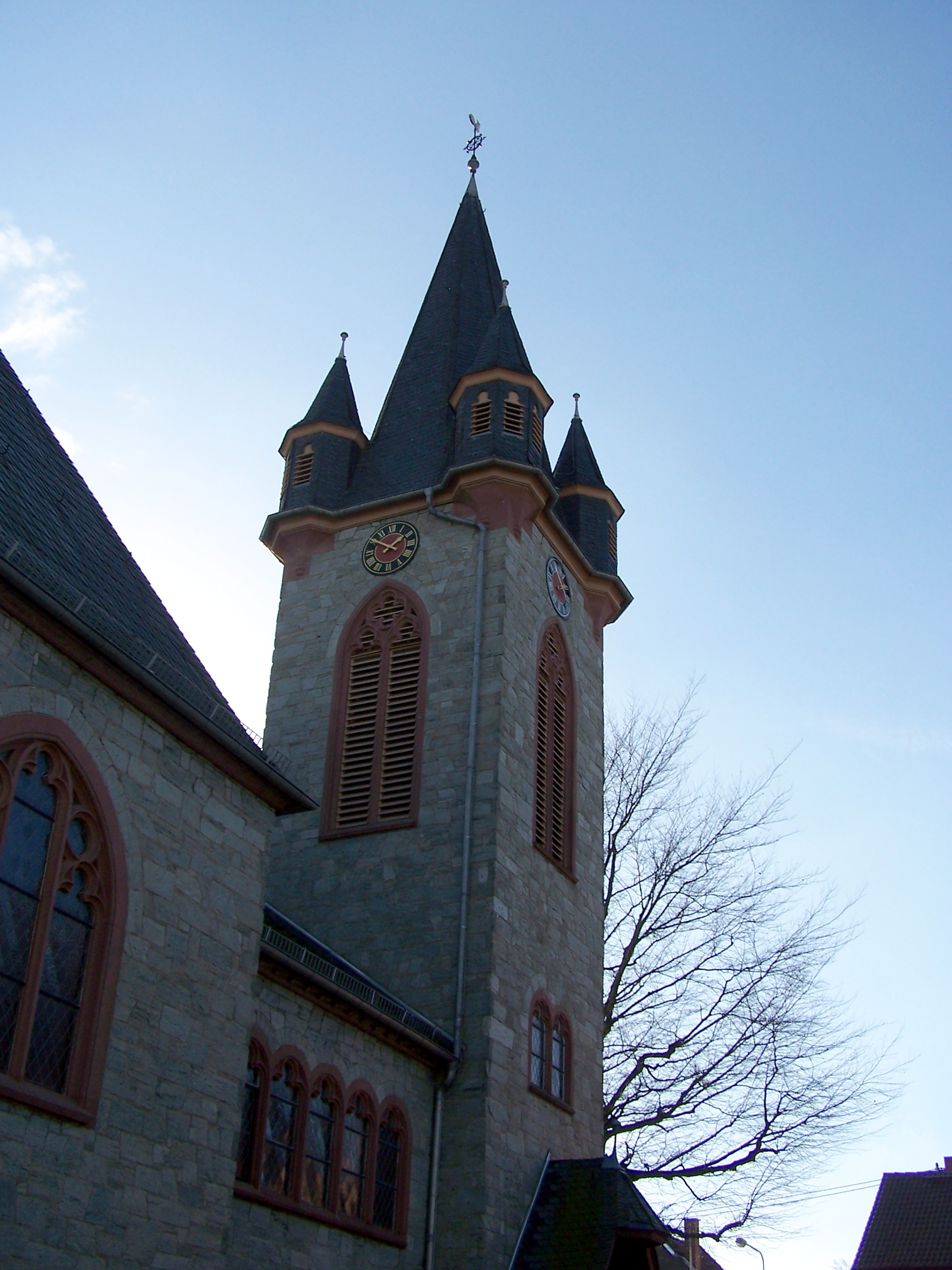 Der neo-gotische Kirchturm der evangelischen Gemeinde Sindlingen-Süd in der Gustavsallee.